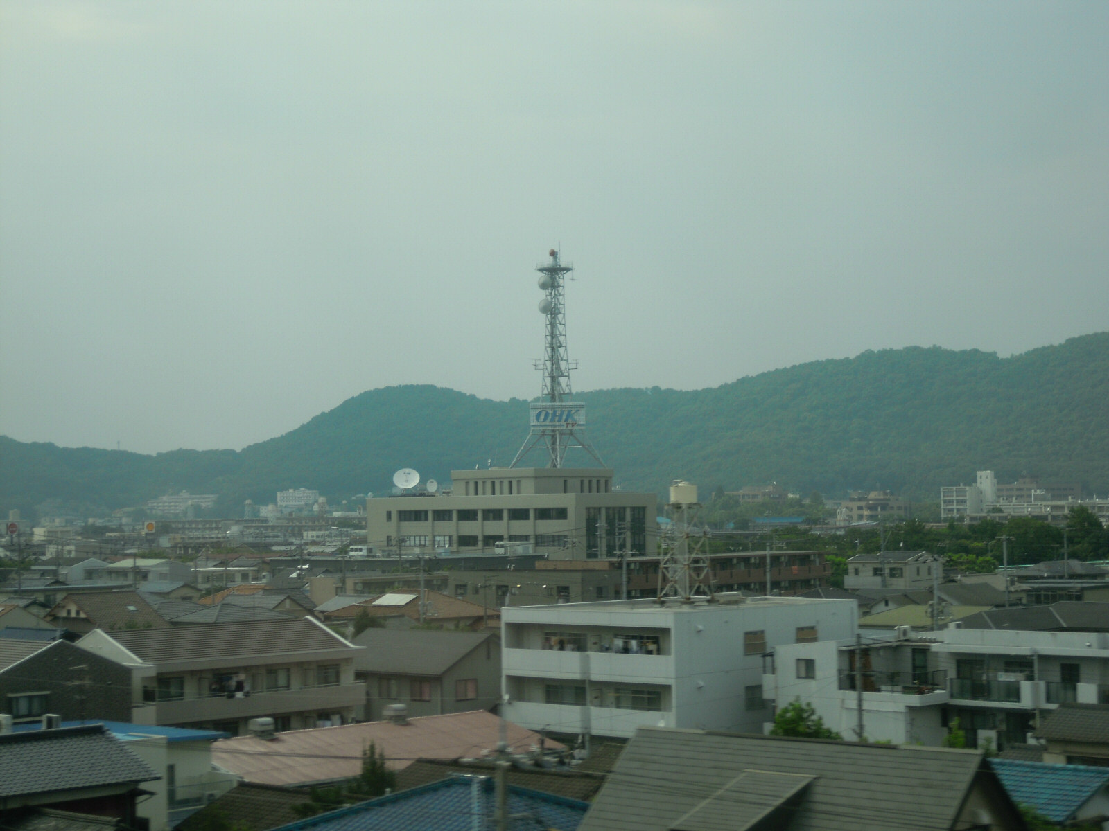 Okayama Broadcasting